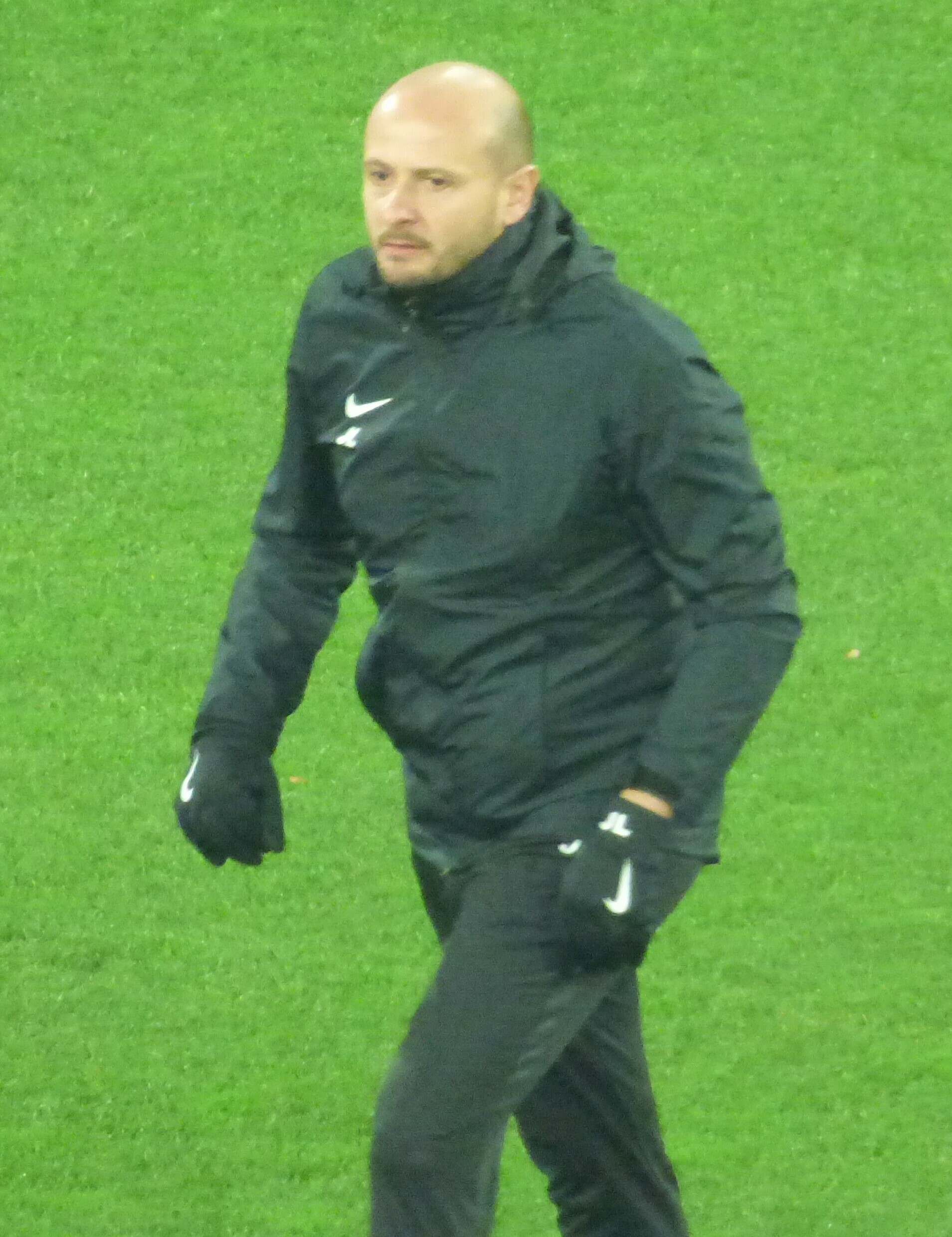 Julien Lachuer avant le match RC Lens / Stade brestois, le 4 décembre 2018, comptant pour la dix-septième journée du championnat de France de football de Ligue 2 2018-2019, au Stade Bollaert-Delelis.